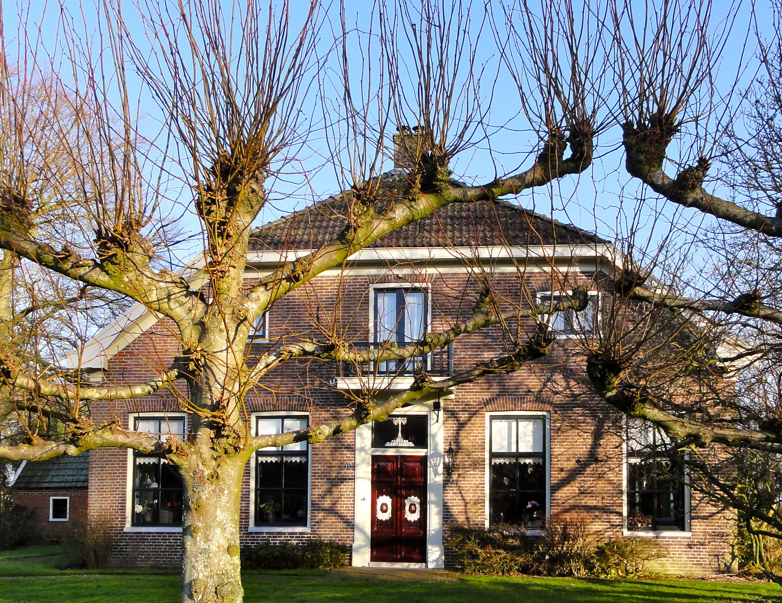 Braams Hof aan de Hoofdstraat 21 te Eext, niet te verwarren met de Braamshof aan De Gieterstaat 3 te Eext